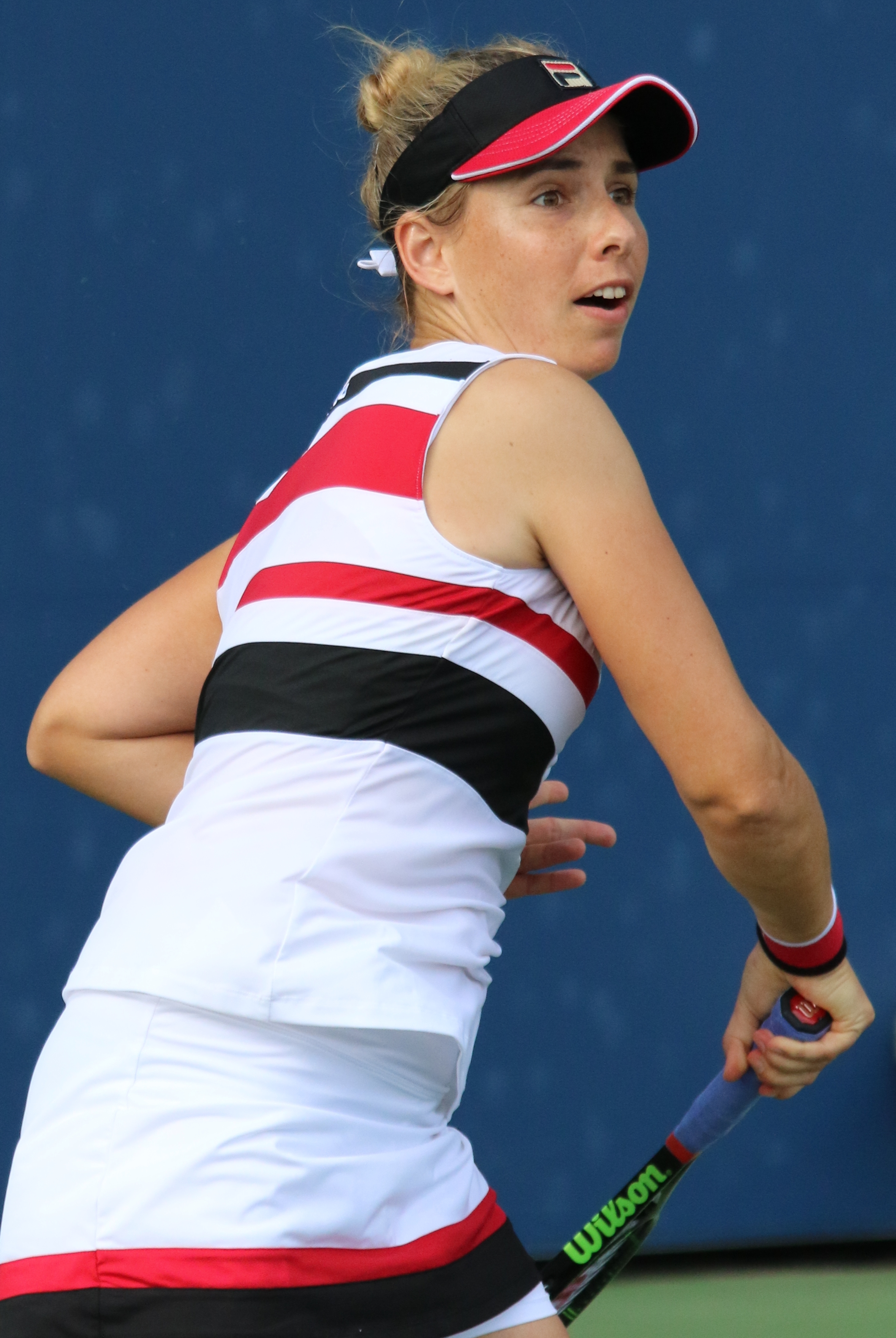 Erakovic US16 (27)